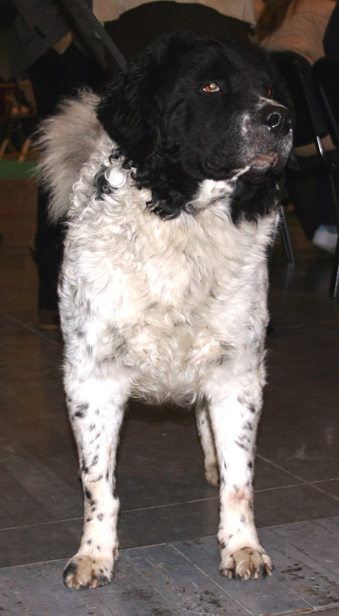 Fryzyjski_pies_wodny na Światowej Wystawie Psów Rasowych w Poznaniu